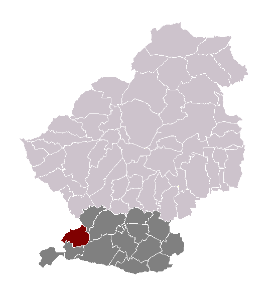 Estrées dans son canton et son arrondissement